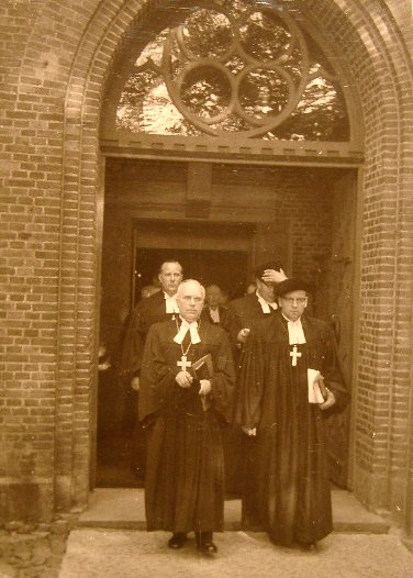 Propst Hans Egon Ptersen mit Bischof Dr. Reinhard Wester